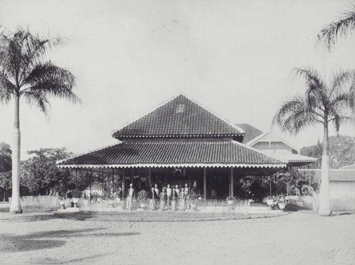 Foto. Regentenwoning te Cianjur, Preanger